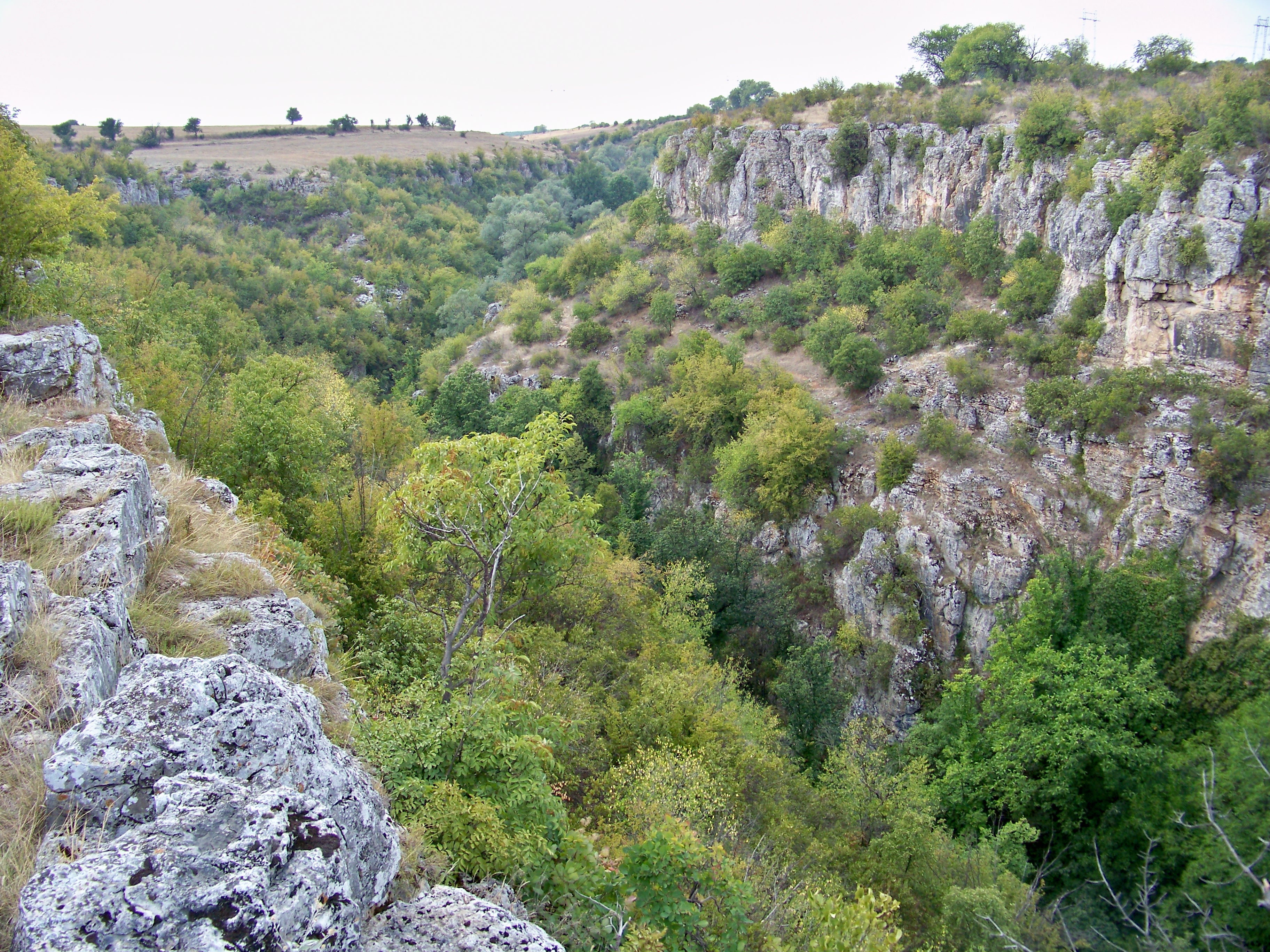 Хотница е село в Северна България.